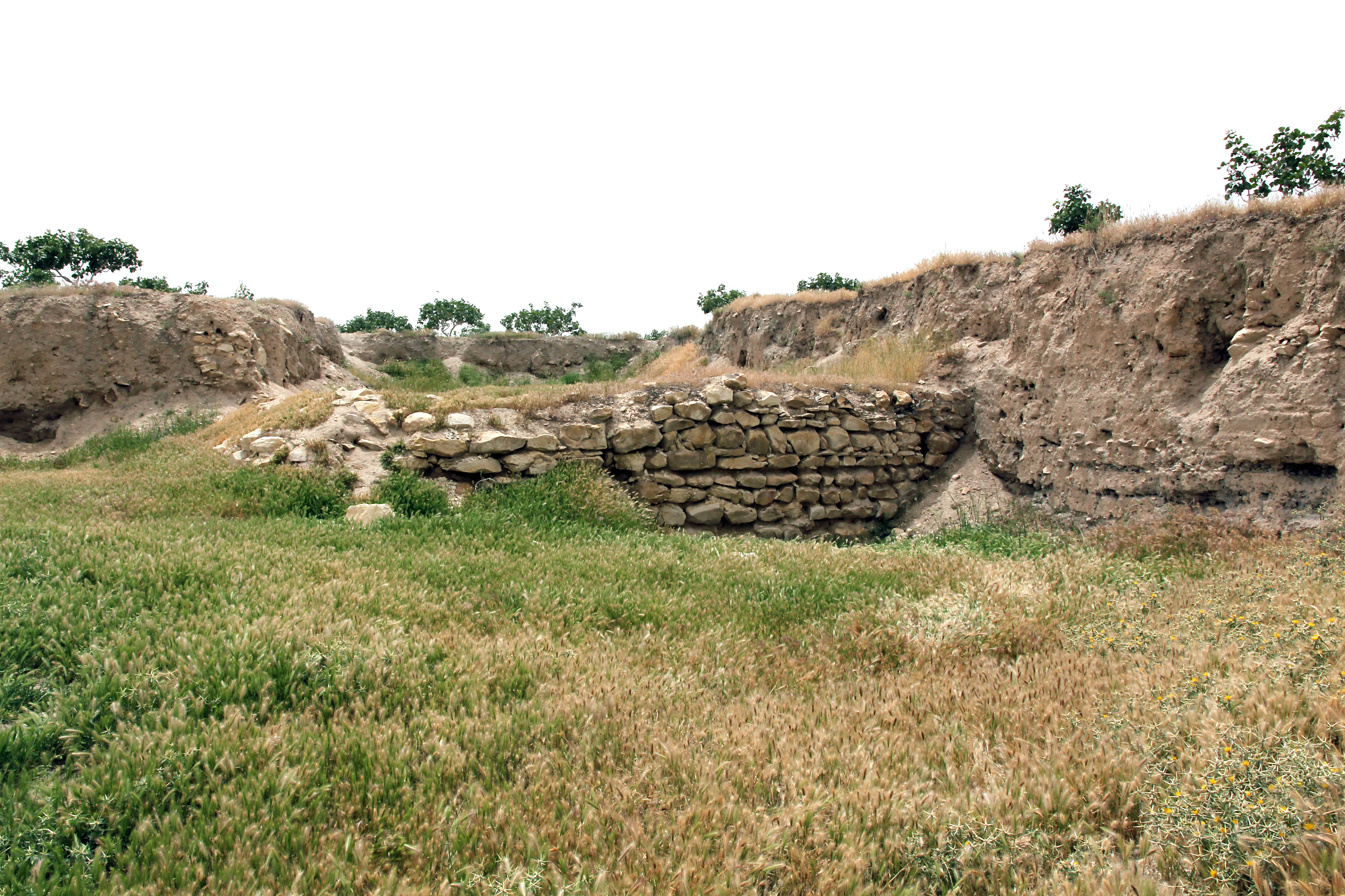 Hacinebi, vorgeschichtlicher Siedlungshügel bei Birecik, Südtürkei